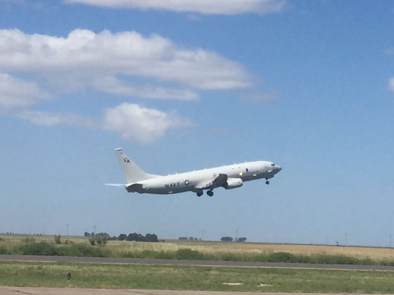 P-8 Poseidon de la Marina de Estados Unidos despegando desde Bahía Blanca, durante la búsqueda del submarino argentino ARA San Juan